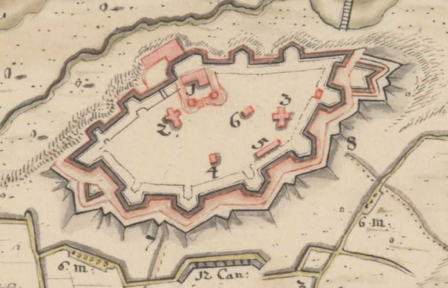 Беларуская (тарашкевіца): Быхаўская фартэцыя ў першай палове XVIII ст.